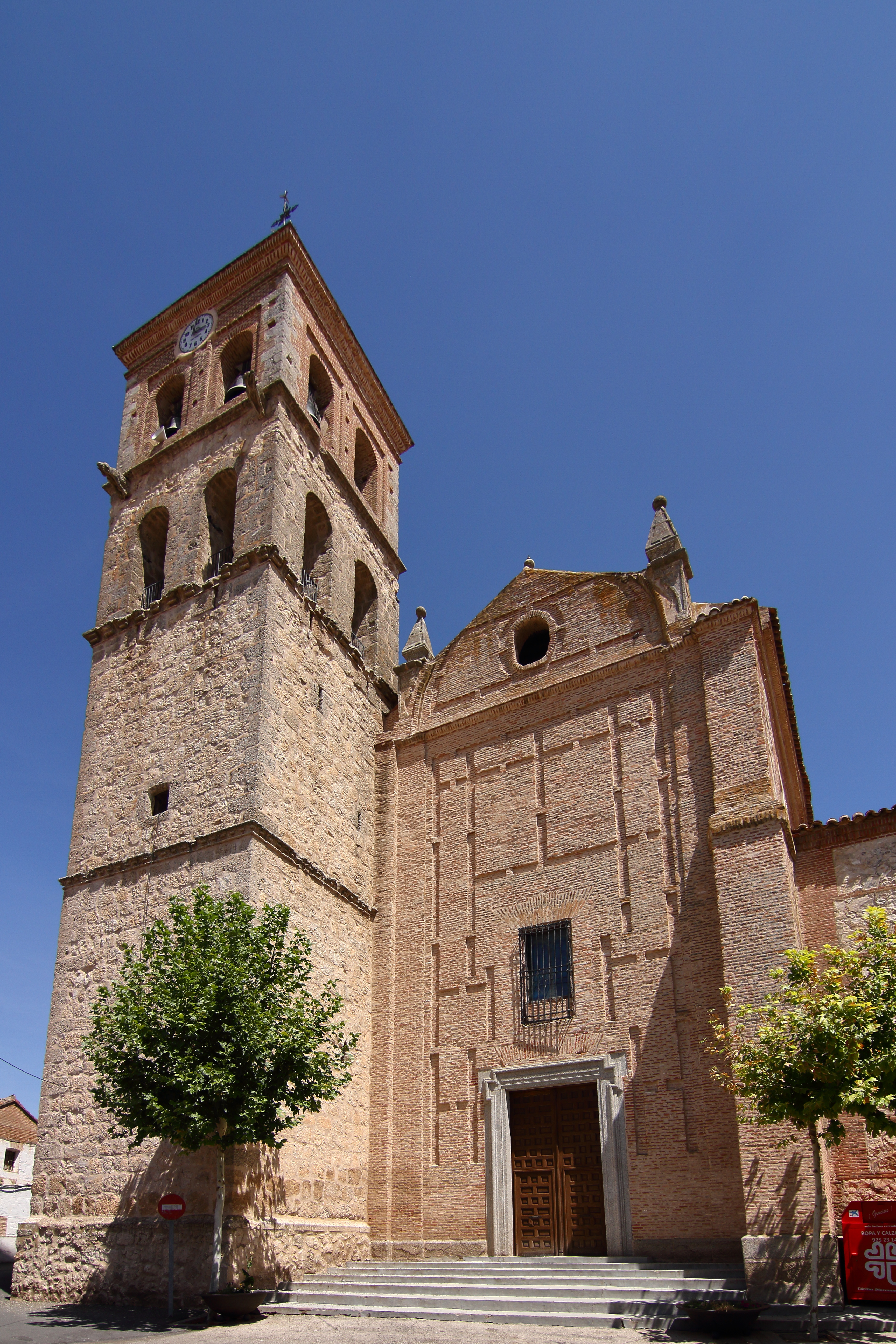 Novés, Iglesia de San Pedro Apóstol, 01